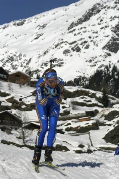 See Title